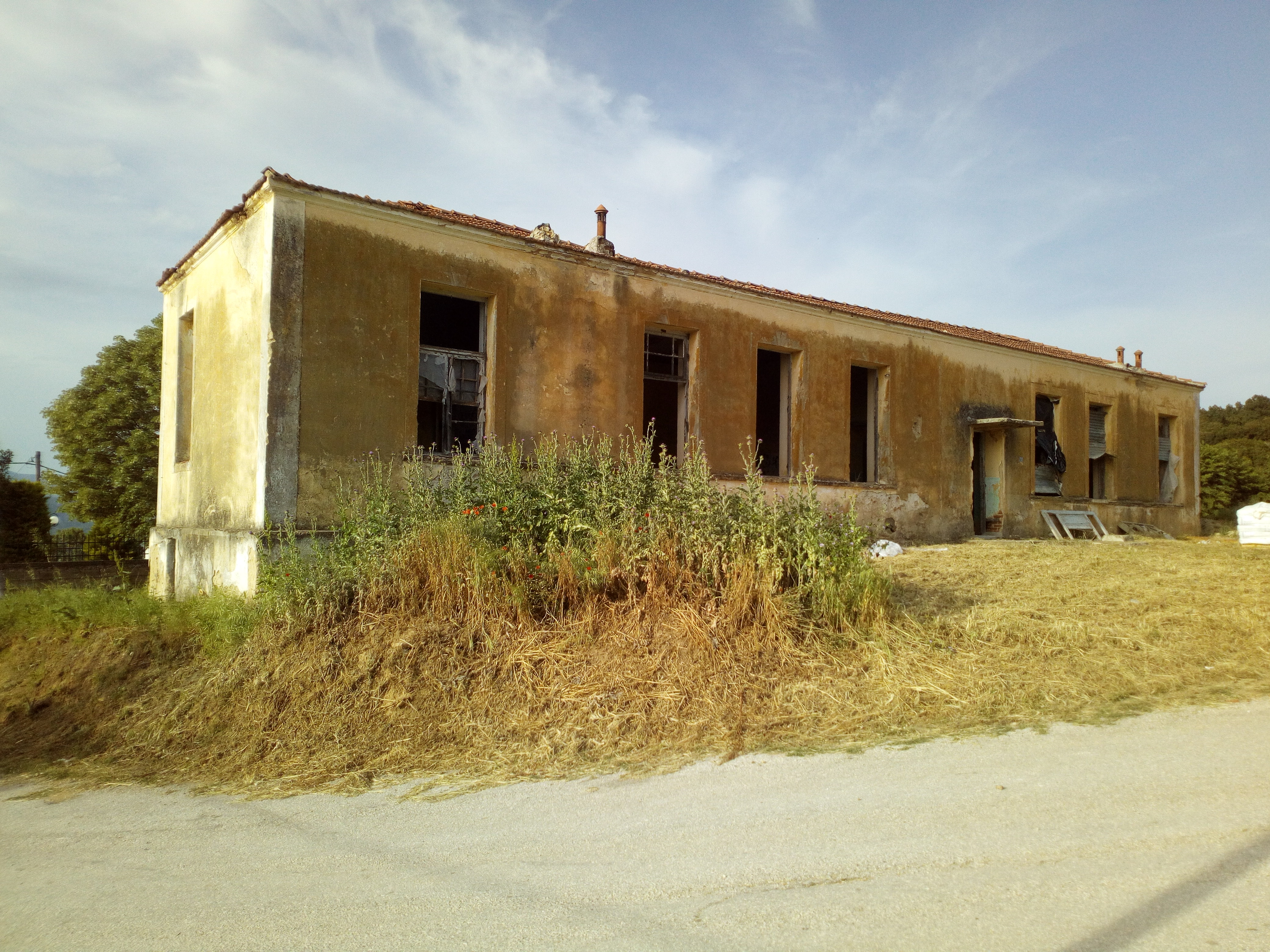 Χτίστηκε το 1925 και λειτούργησε μέχρι το 1978. DS1 20180429 182437